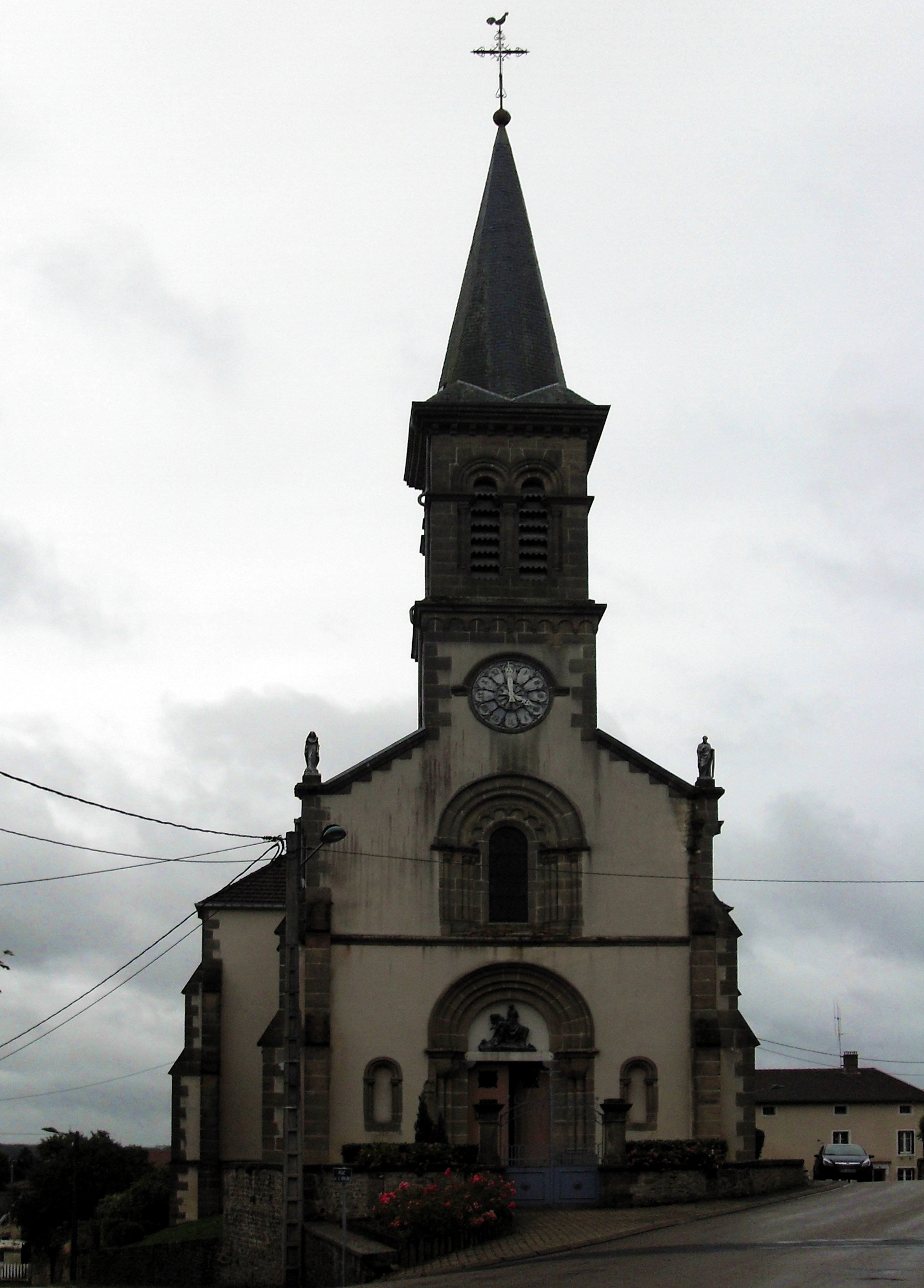 L'église Saint-Martin de Monthureux-le-Sec